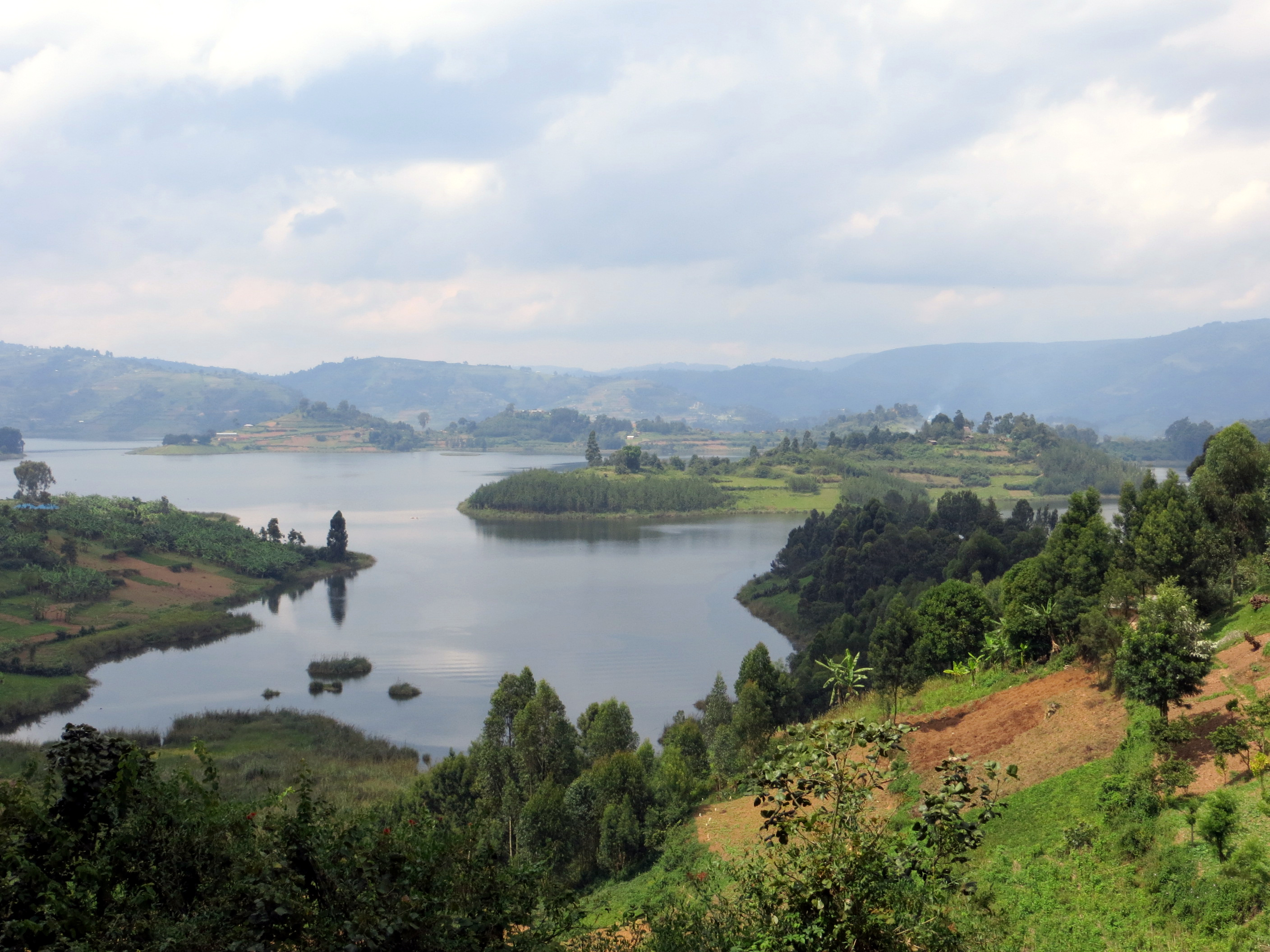 Uganda.